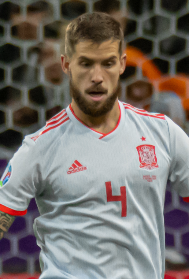 UEFA EURO qualifiers Sweden vs Spain 20191015